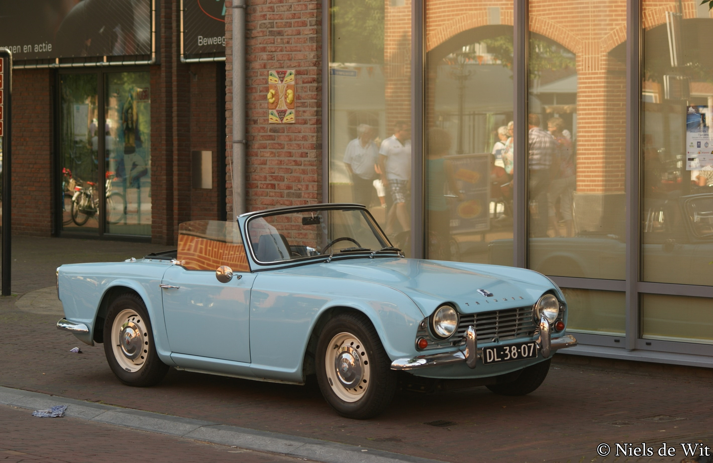 DL-38-07